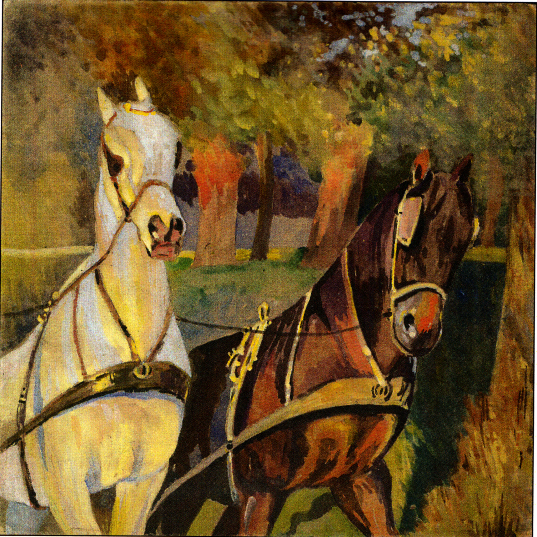 Reprodukce ukázky z tvorby M. Fassatiho